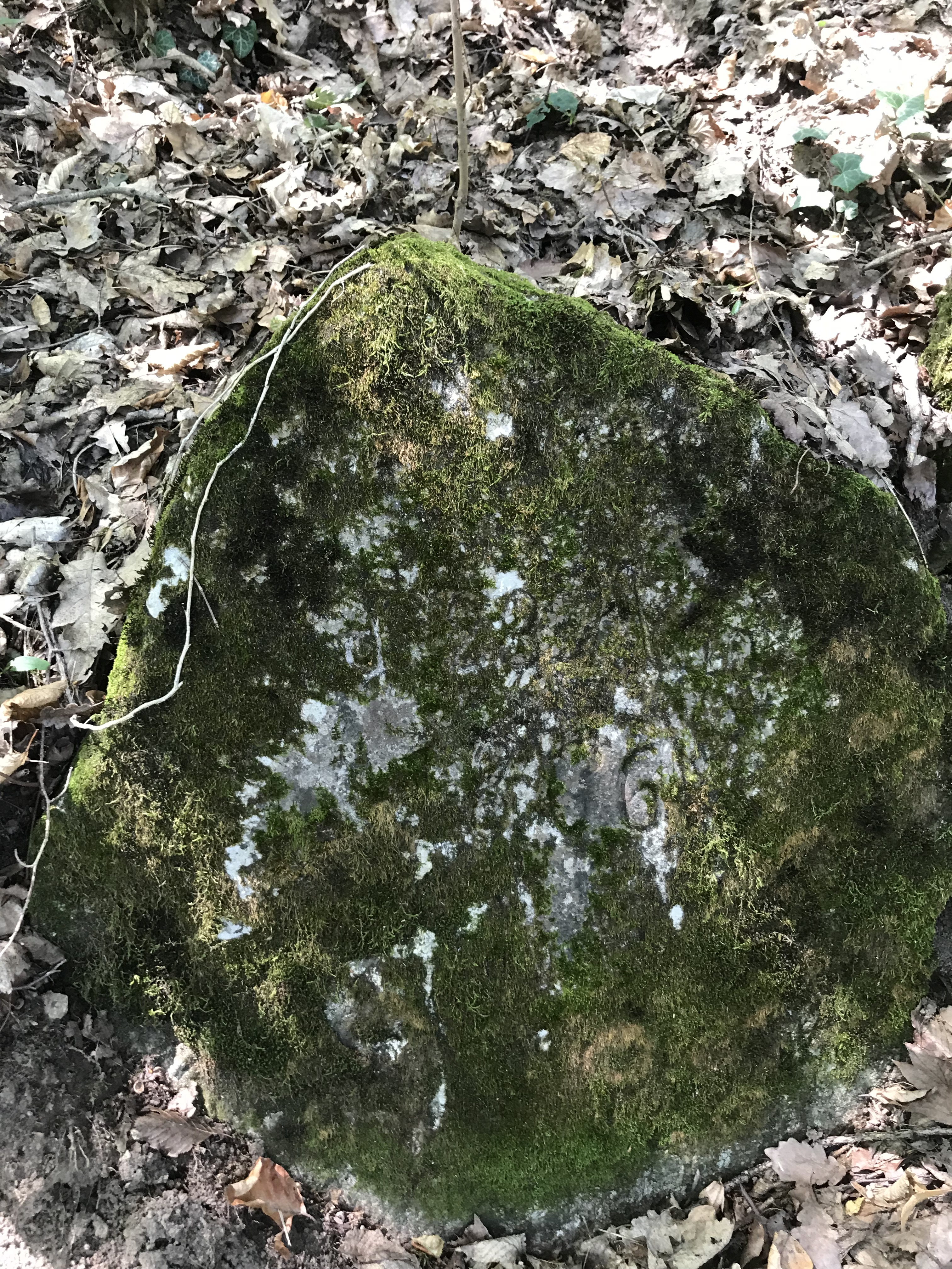 Erinnerungsstein für den Prager Frieden (1866) in der Fränkenauer Hohle, Bad Kösen